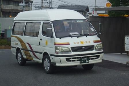 築城町コミュニティバスの車両